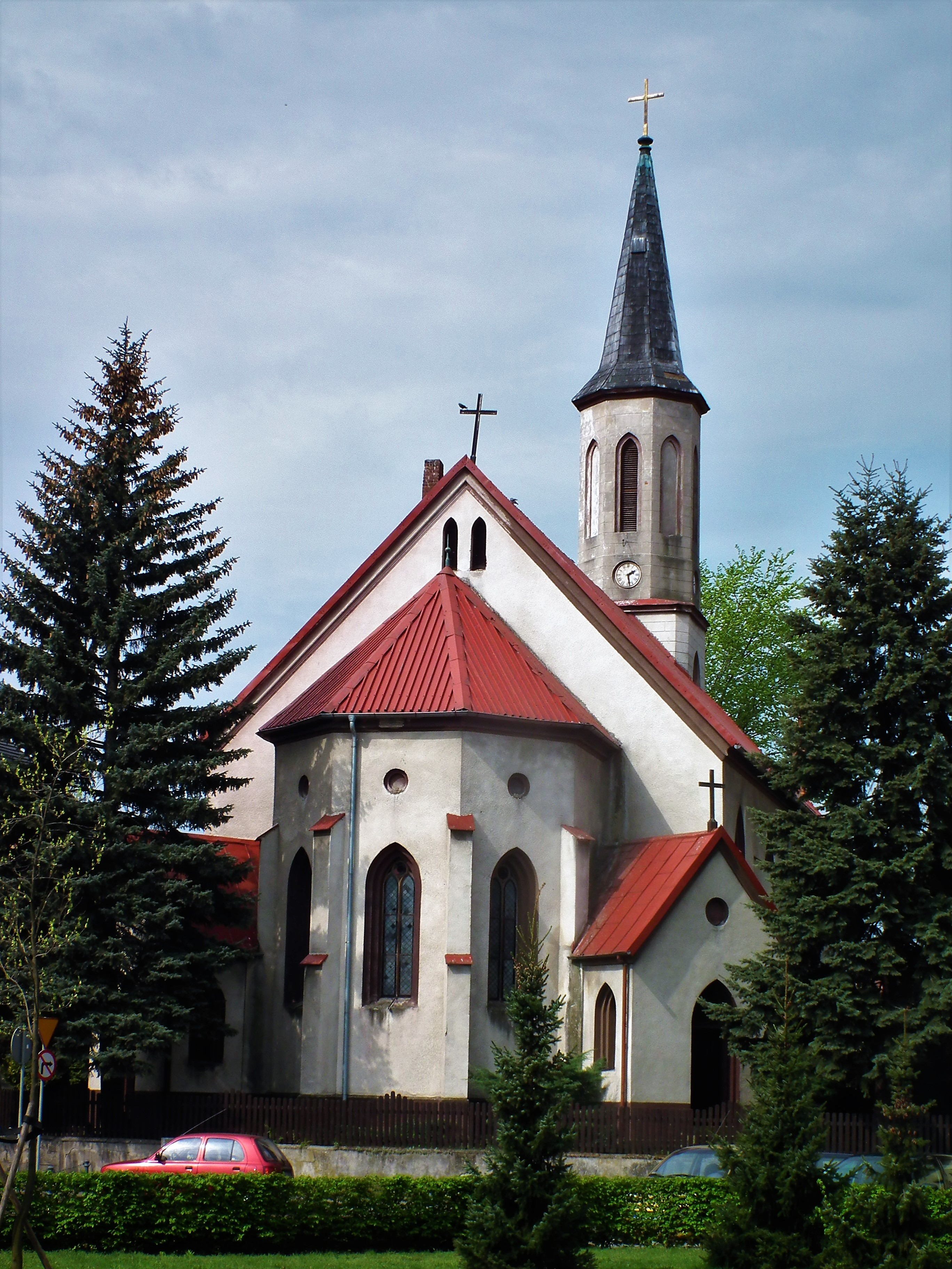 Kościół ewangelicko-augsburski w Gorzowie Śl.